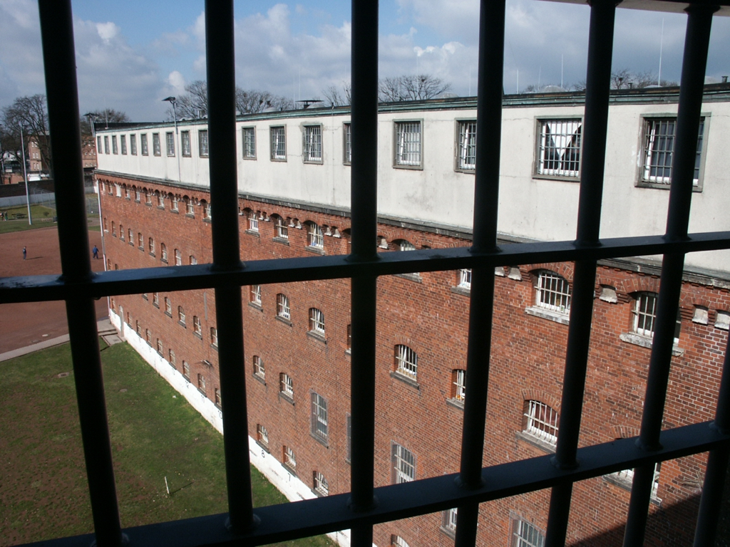 Blick aus dem Hauptgebäude JVA Fuhlsbüttel, santa Fu, Hamburg - Pressetermin am 7. April 2006